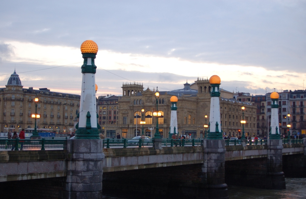 San Sebastián (España)